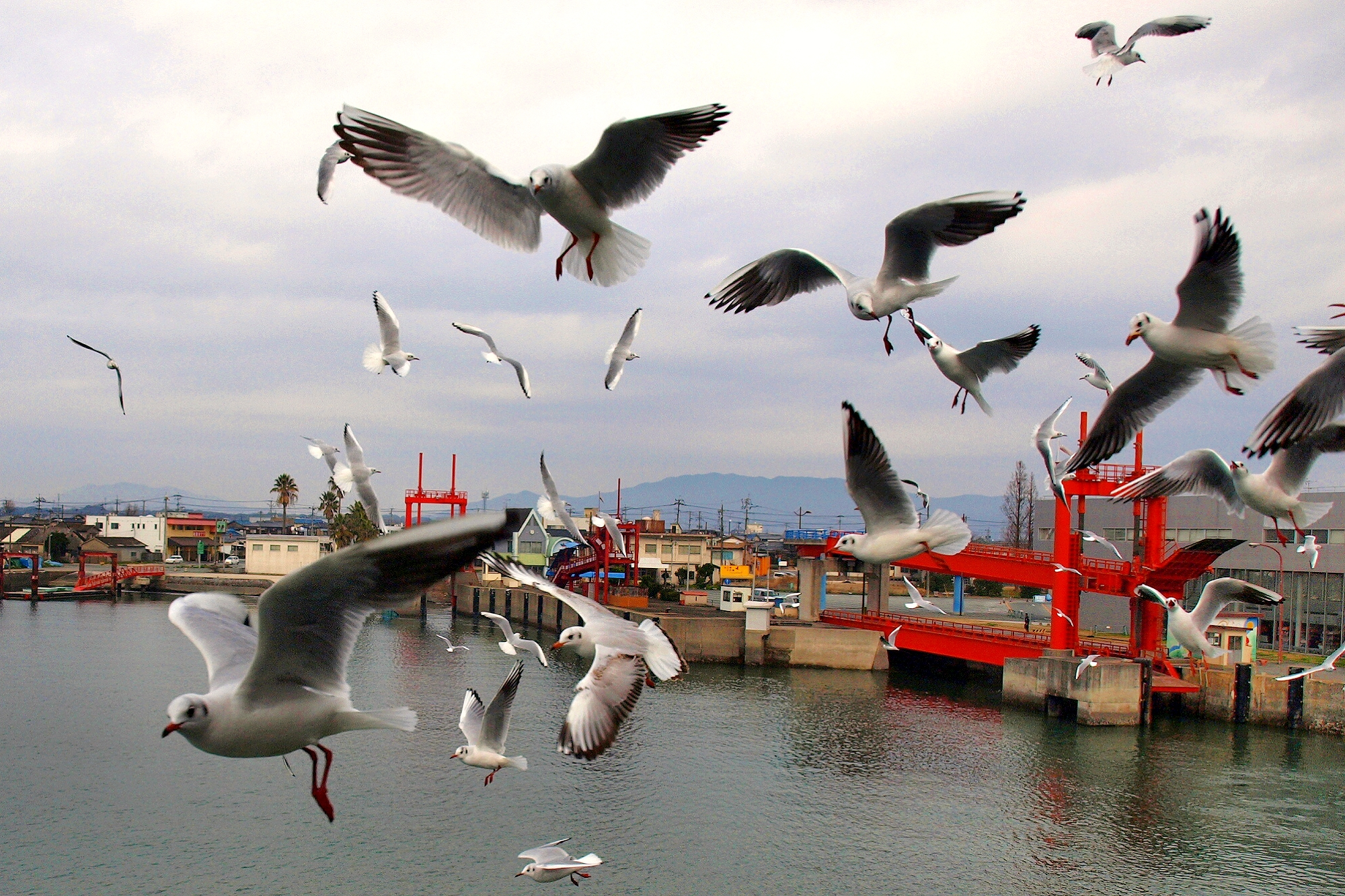 乗客からの餌を求めてフェリーに群がるカモメ。 （2009年2月5日 長洲港）